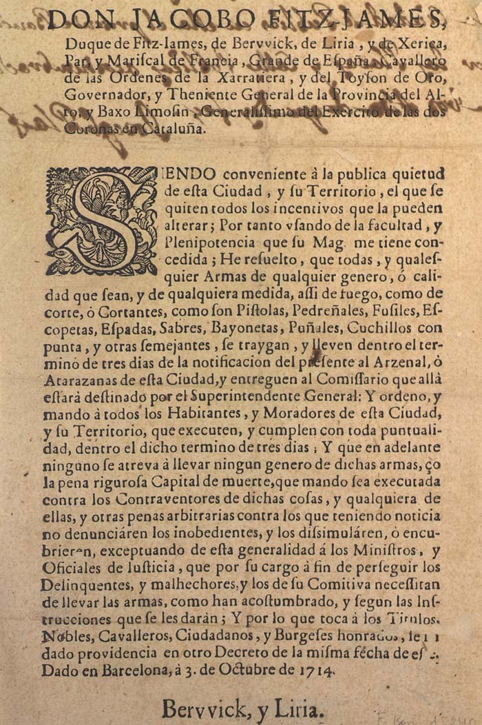 Ban de desarmament decretat per Berwick el 3 d'octubre de 1714